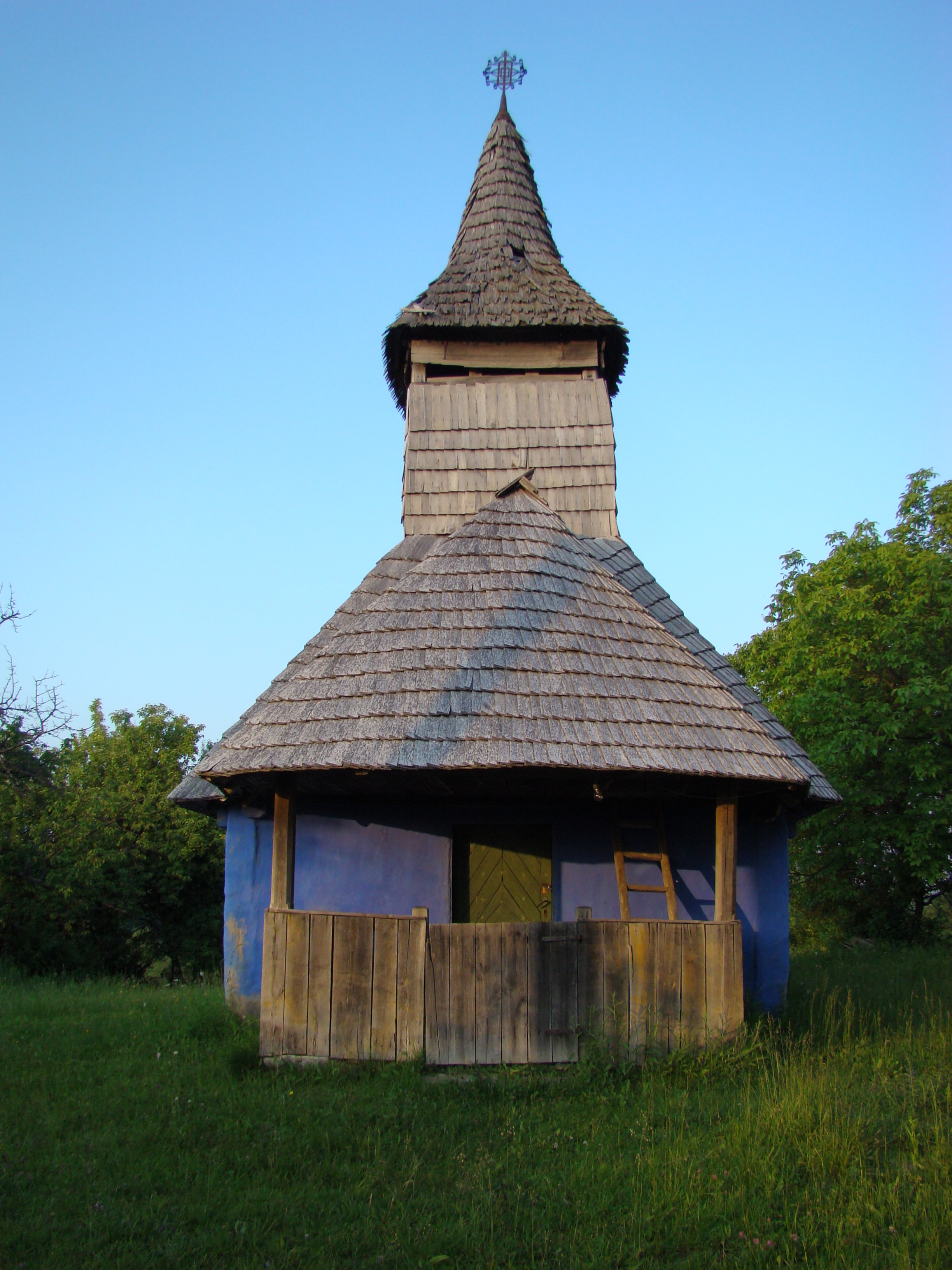 Biserica de lemn "Sfinții Împăraţi" din Aspra